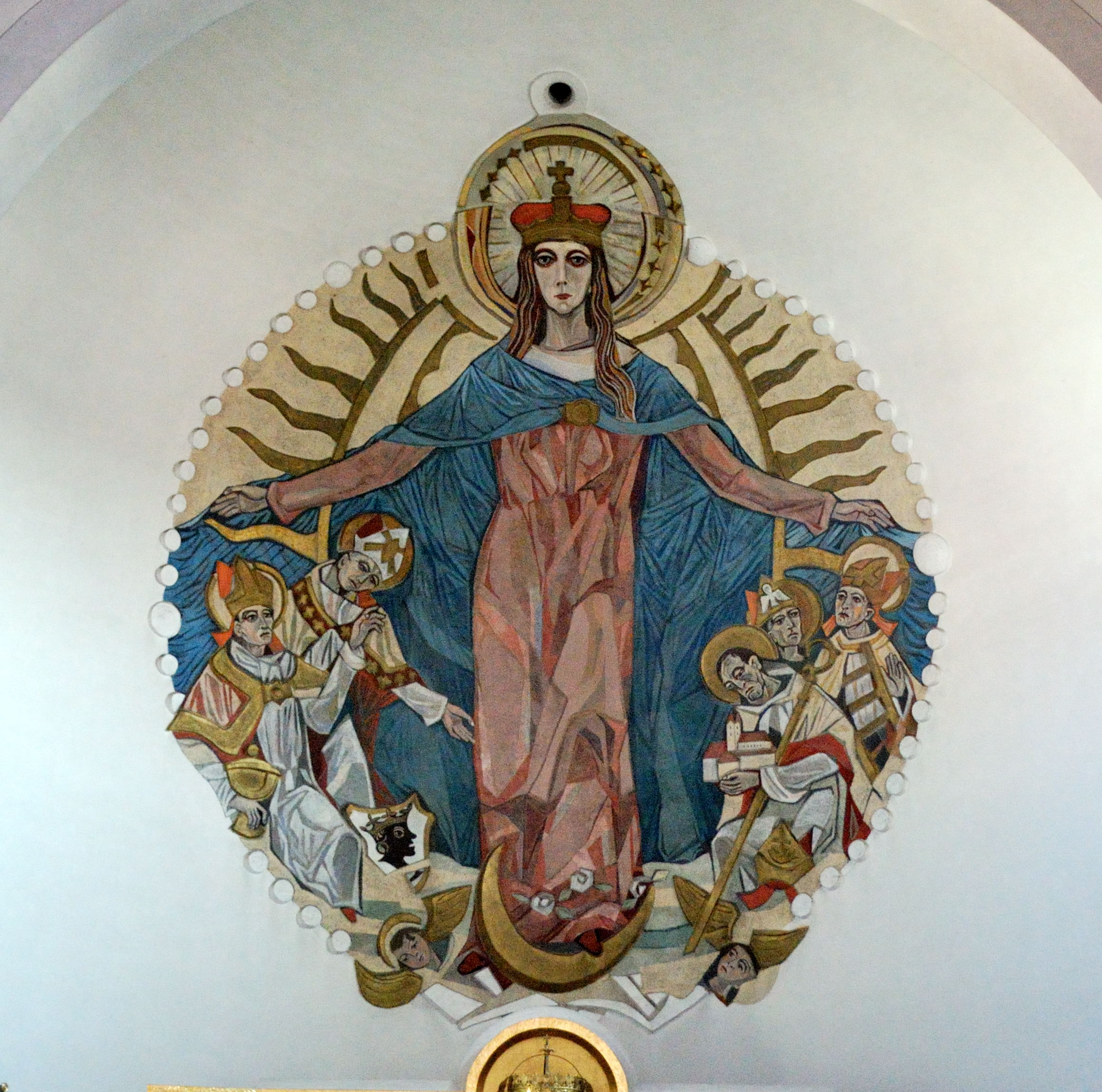 Schutzmantelmadonna in der Apsis